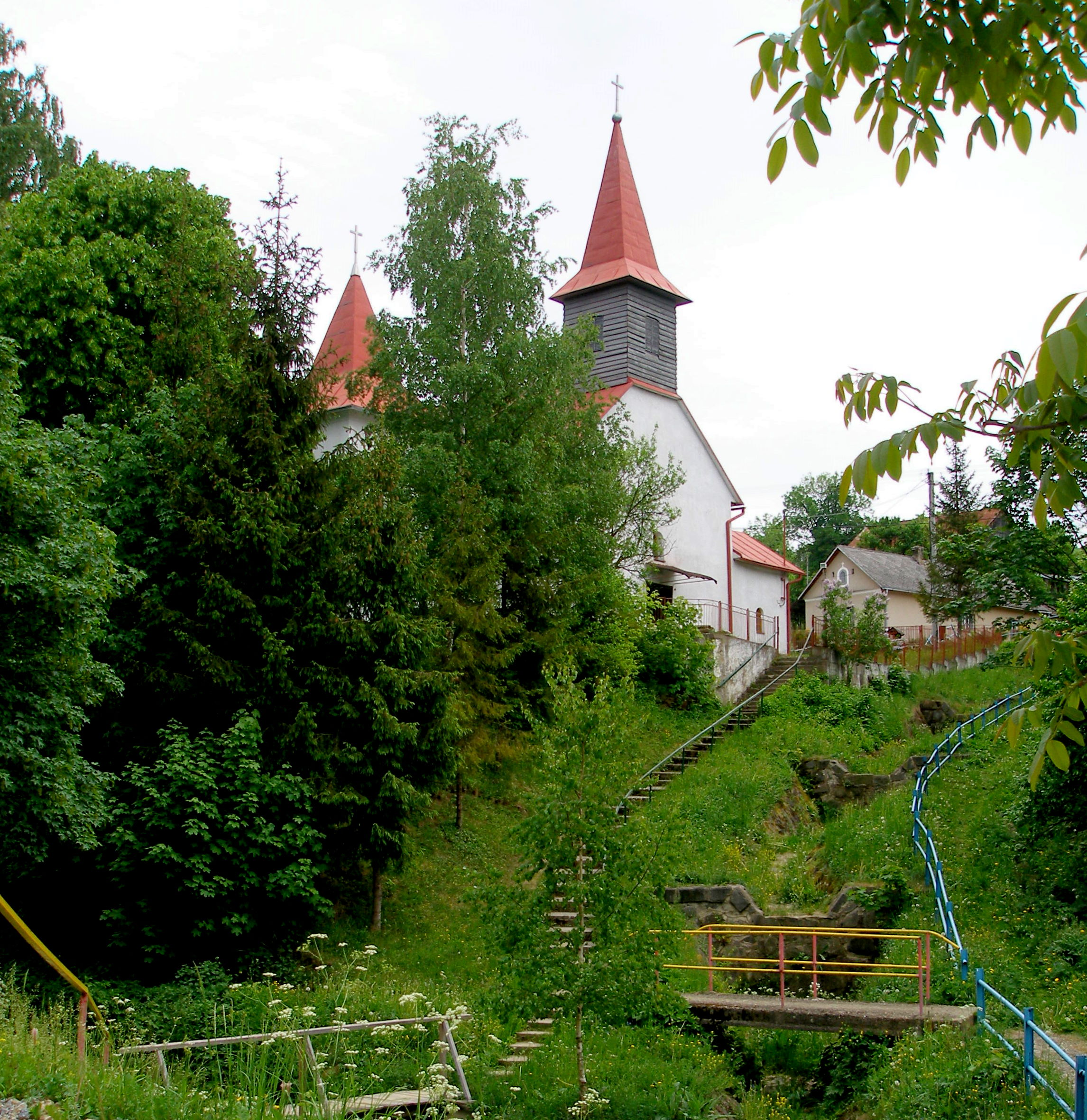 Obec Vysoká okres Sabinov